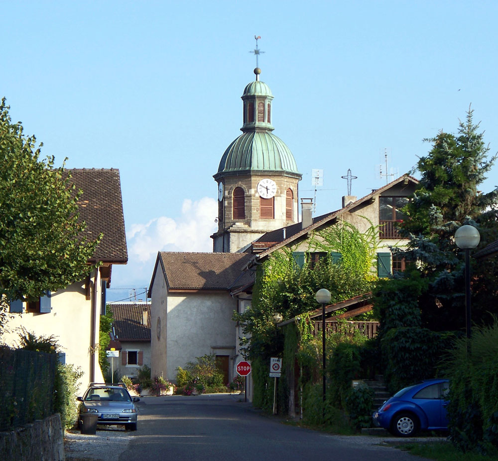 Chens sur Léman, l'église